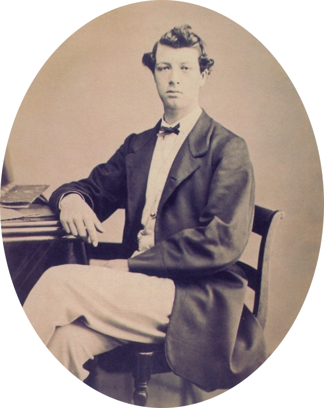 Self-portrait